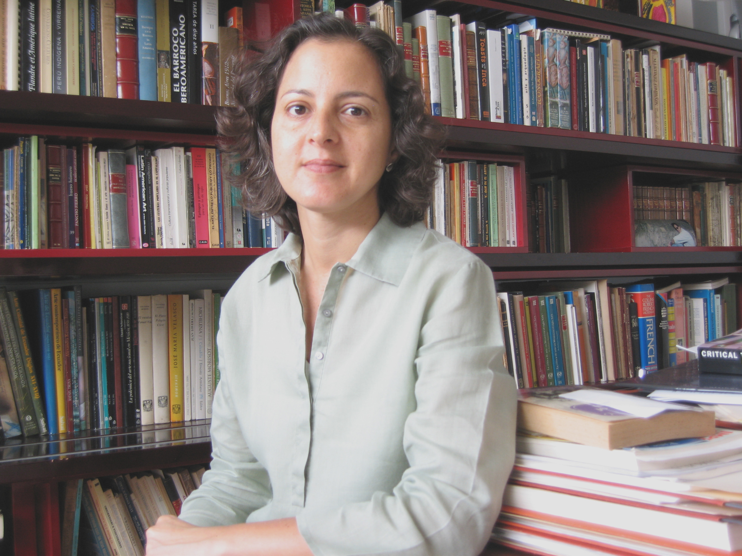 Biblioteca, libros